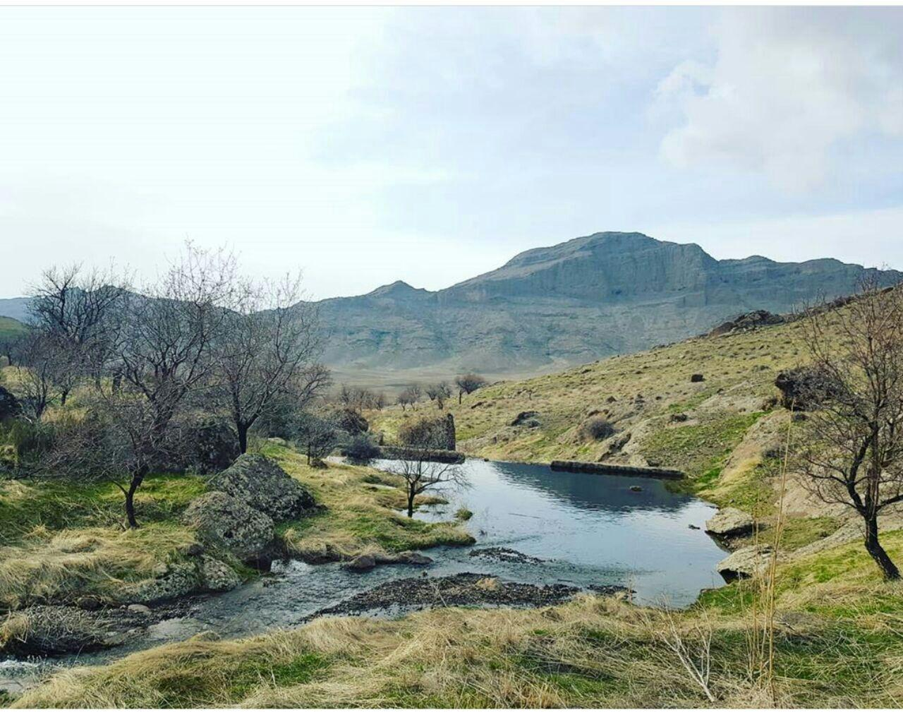 گوزلو